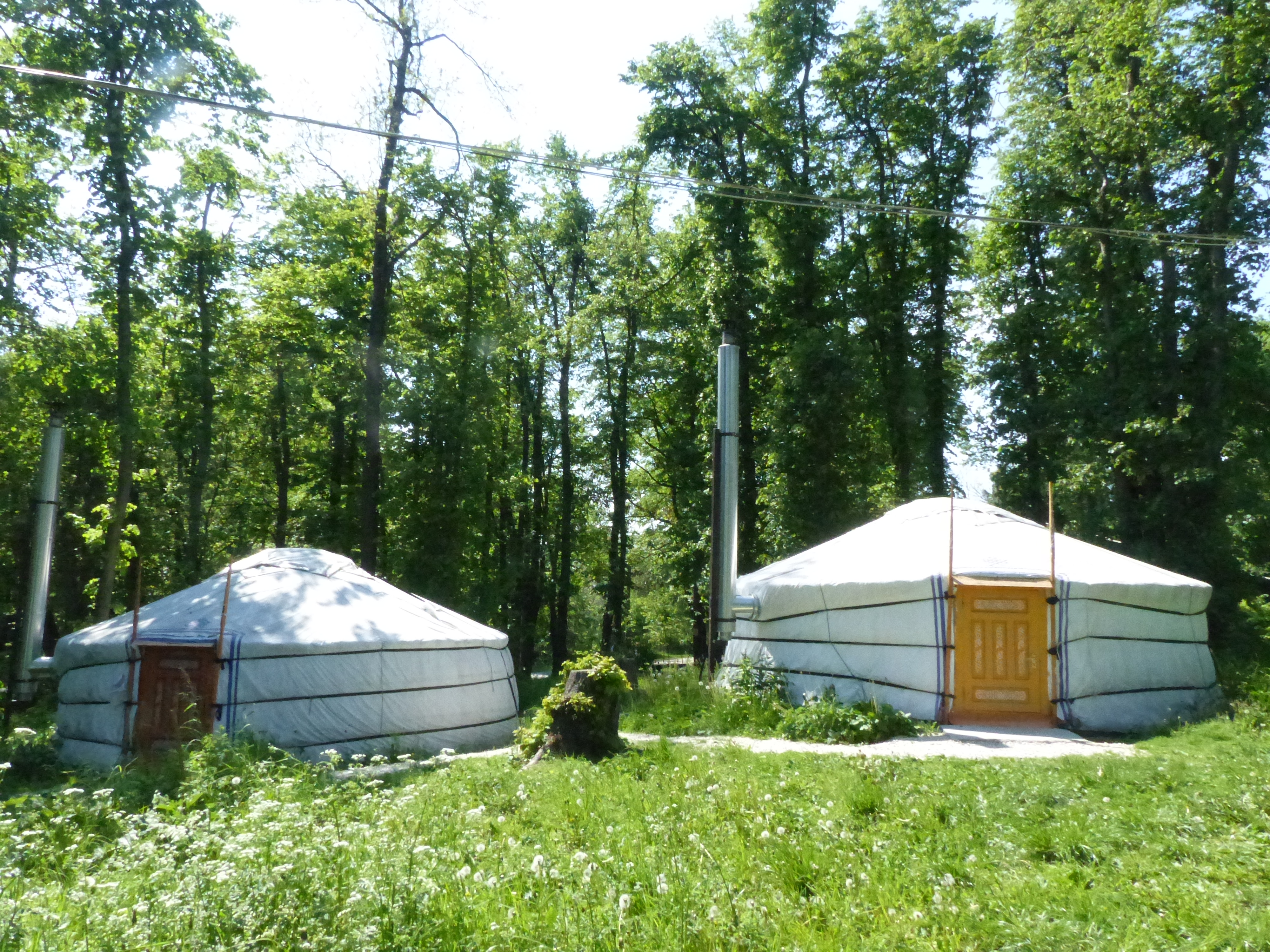 Jurtaszállás. Dobogókő (Pilisszentkereszt). A felvétel 2017. május 20-án szombaton készült. Forrás